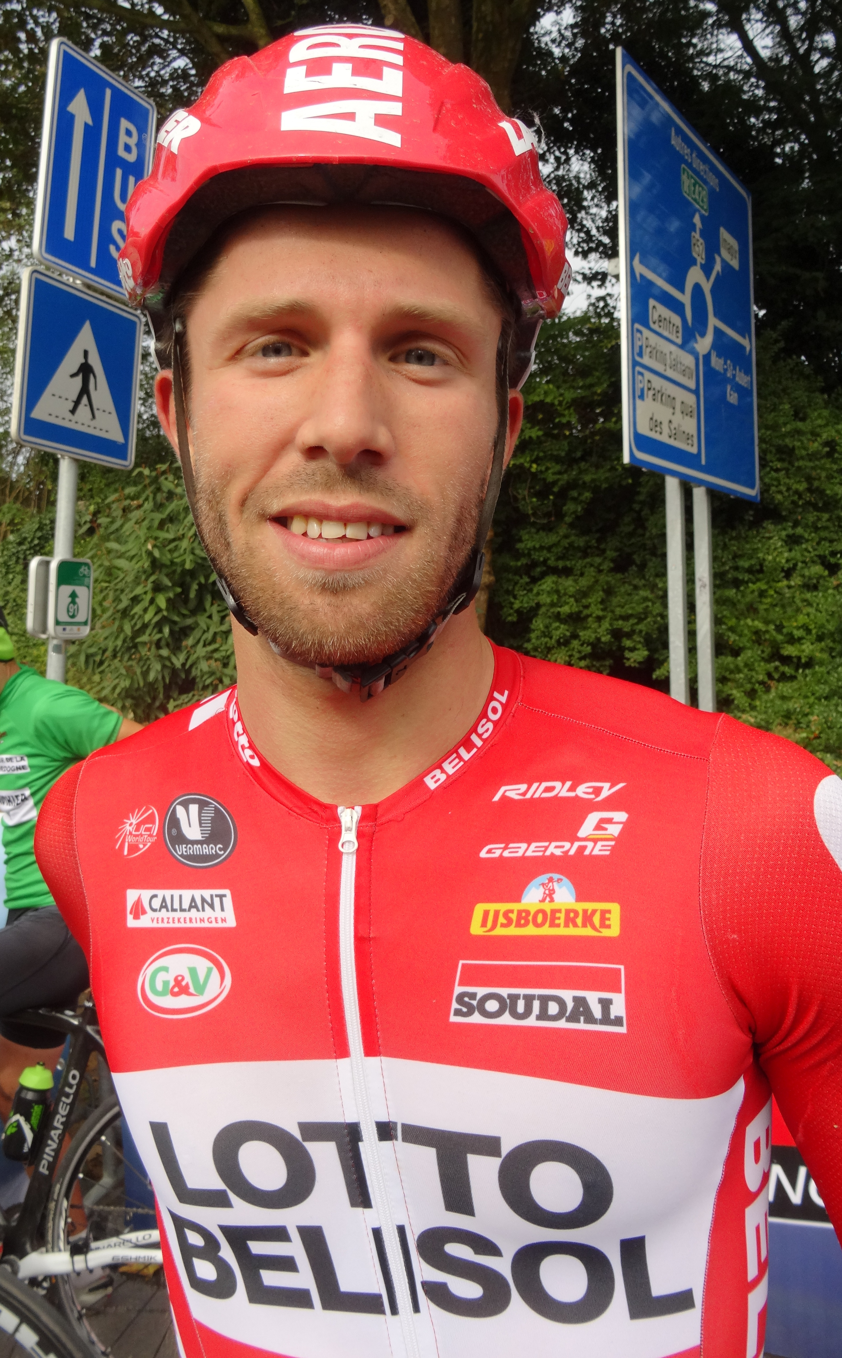 Reportage photographique réalisé le dimanche 5 octobre à l'occasion de l'arrivée de la quatrième étape de l'Eurométropole Tour 2014 à Tournai, Belgique.